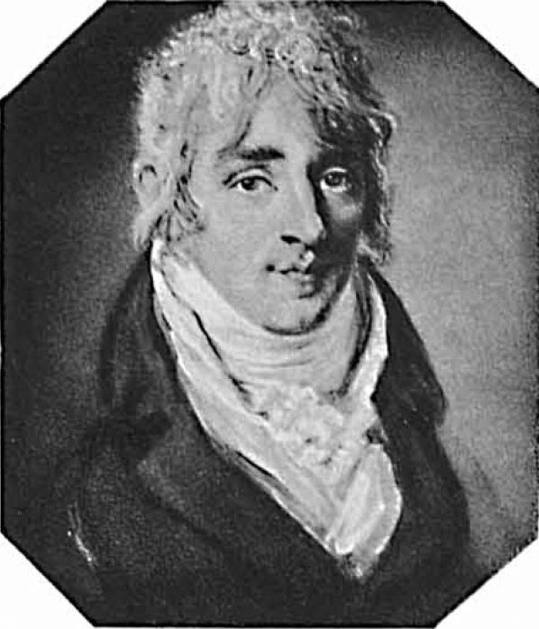 Граф Лев Кириллович Разумовский (1757-1818)